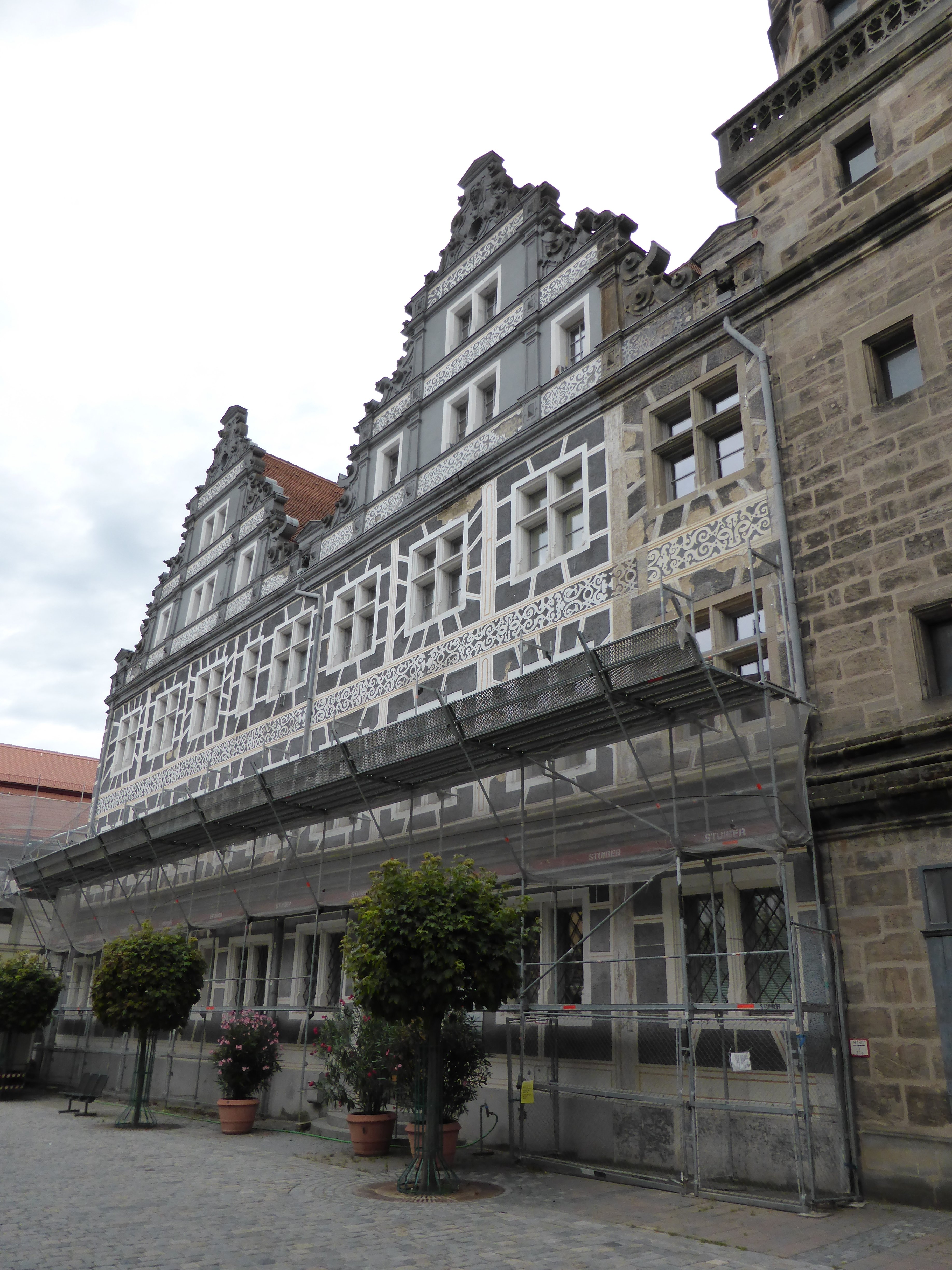 Germany, Bayern, Ansbach, Montgelasplatz 1 (ehem. Markgräfl. Hofkanzlei)